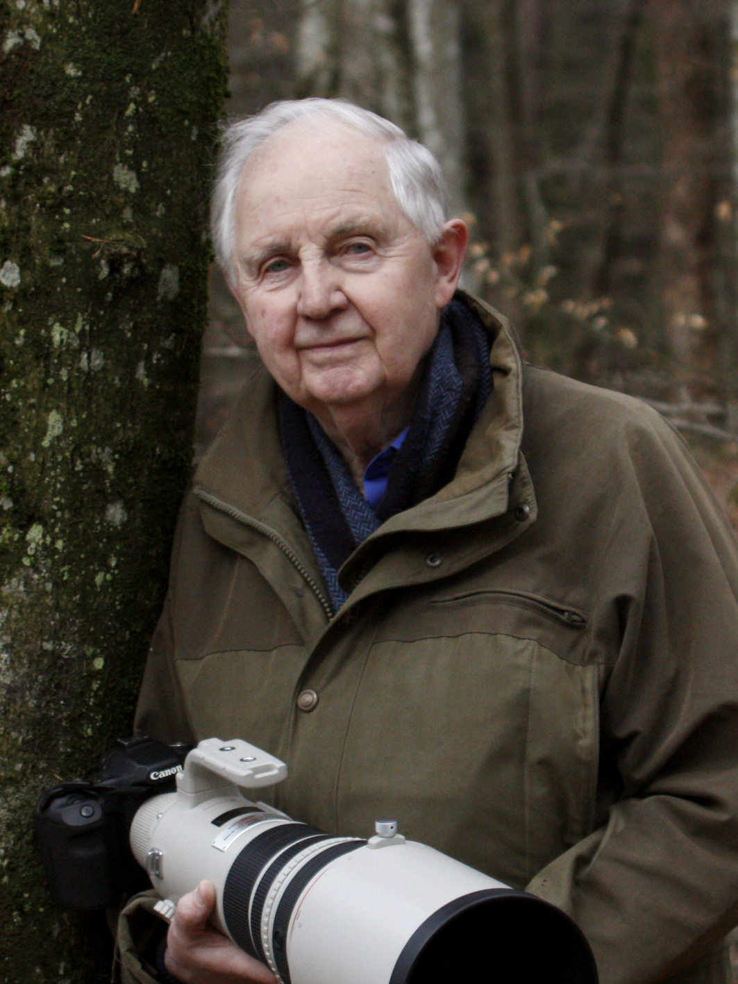 Fotograf Bertil Pettersson